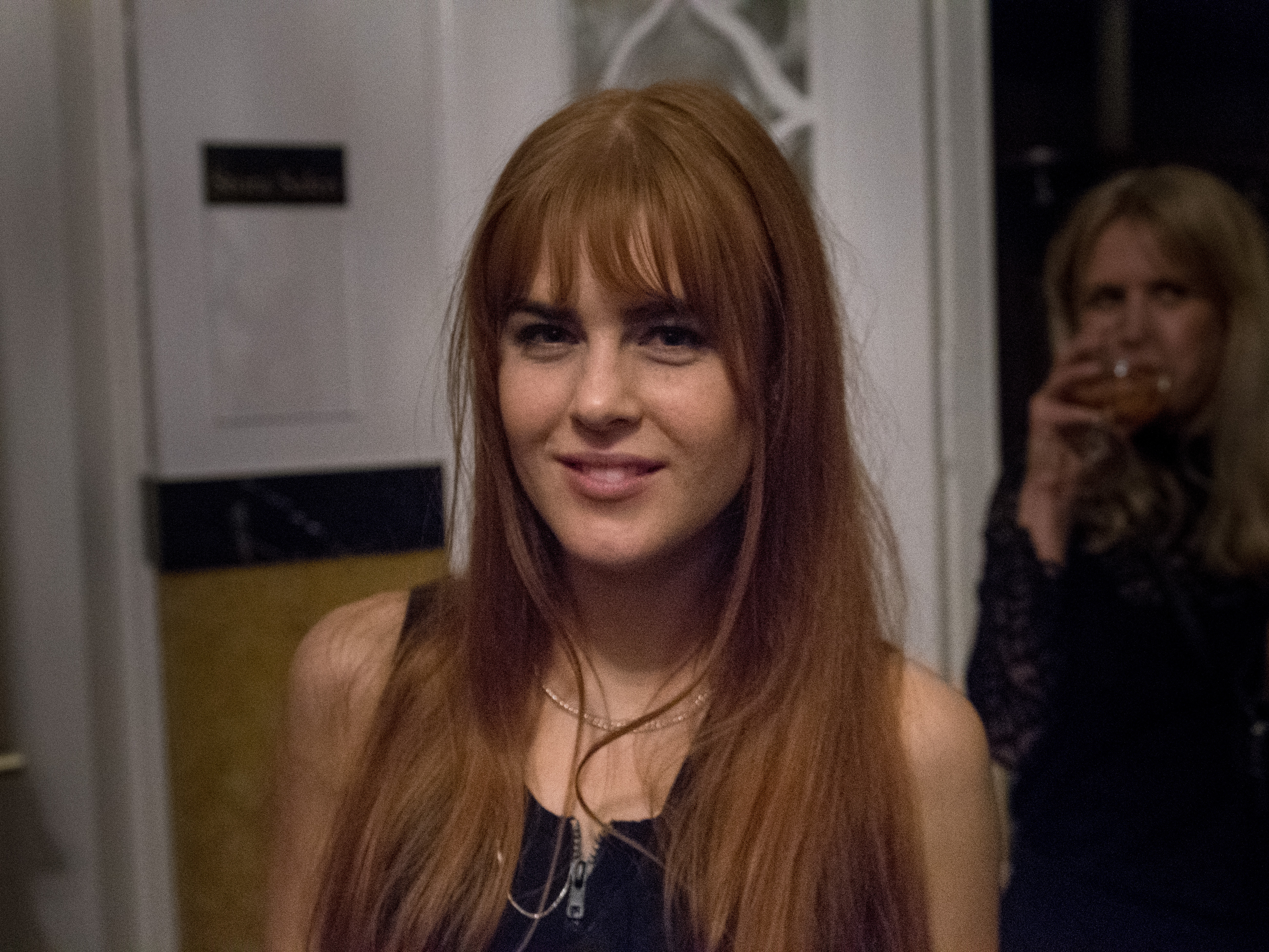 Dotter under efterfesten av Melodifestivalen i Malmö.